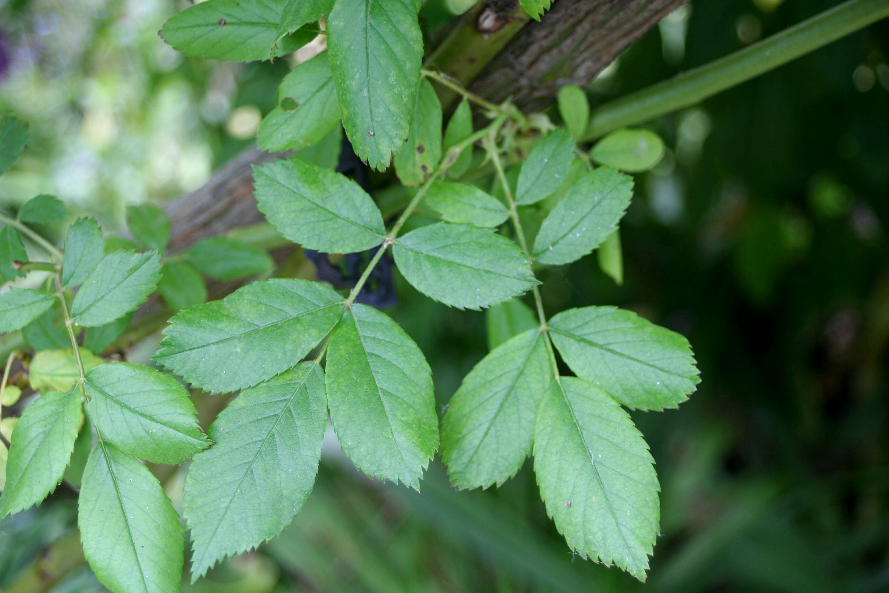 Rose 'Veilchenblau' photographiée dans le jardin de Claude Monet à Giverny - Eure (France)